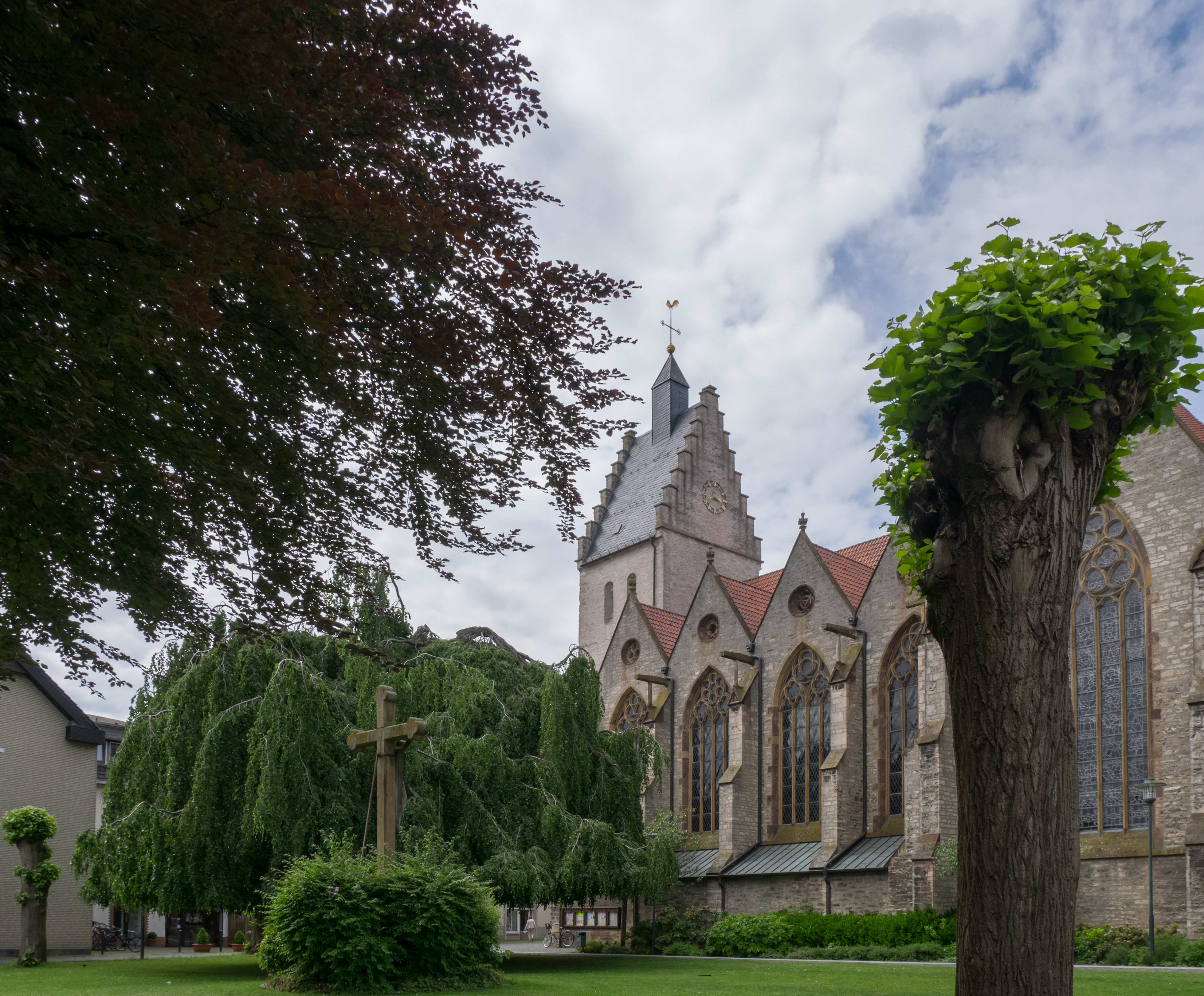 Kirchplatz Bad Laer. Landkreis Osnabrück, Niedersachsen, Deutschland